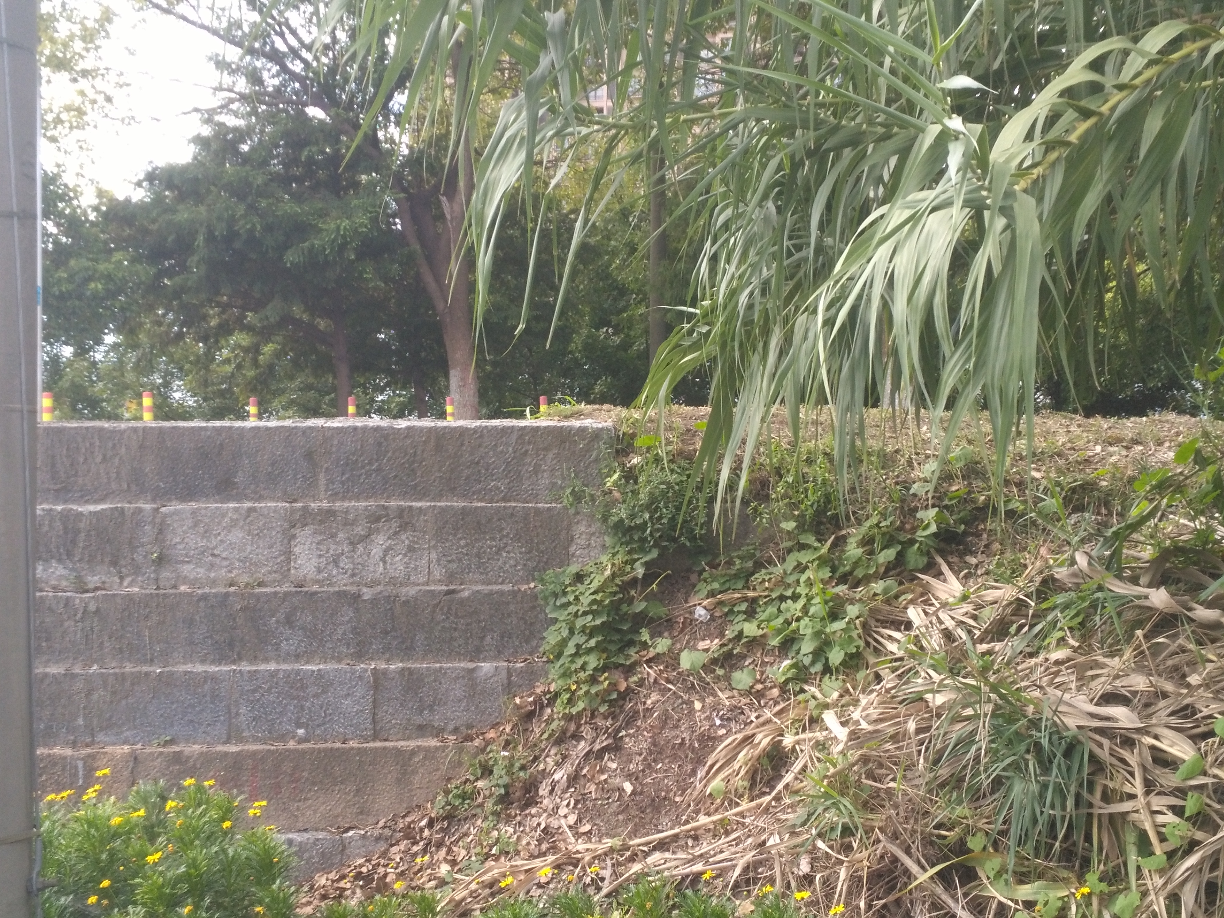 奉贤华亭海塘 柘林镇奉柘公路南侧 清雍正年间(1725～1728年)